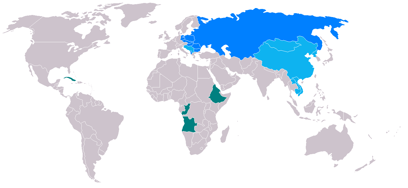 La Orienta Bloko en la mondo inter la jaroj 1945 kaj 1989, adapto laŭ simila bildo en la germana vikipedio